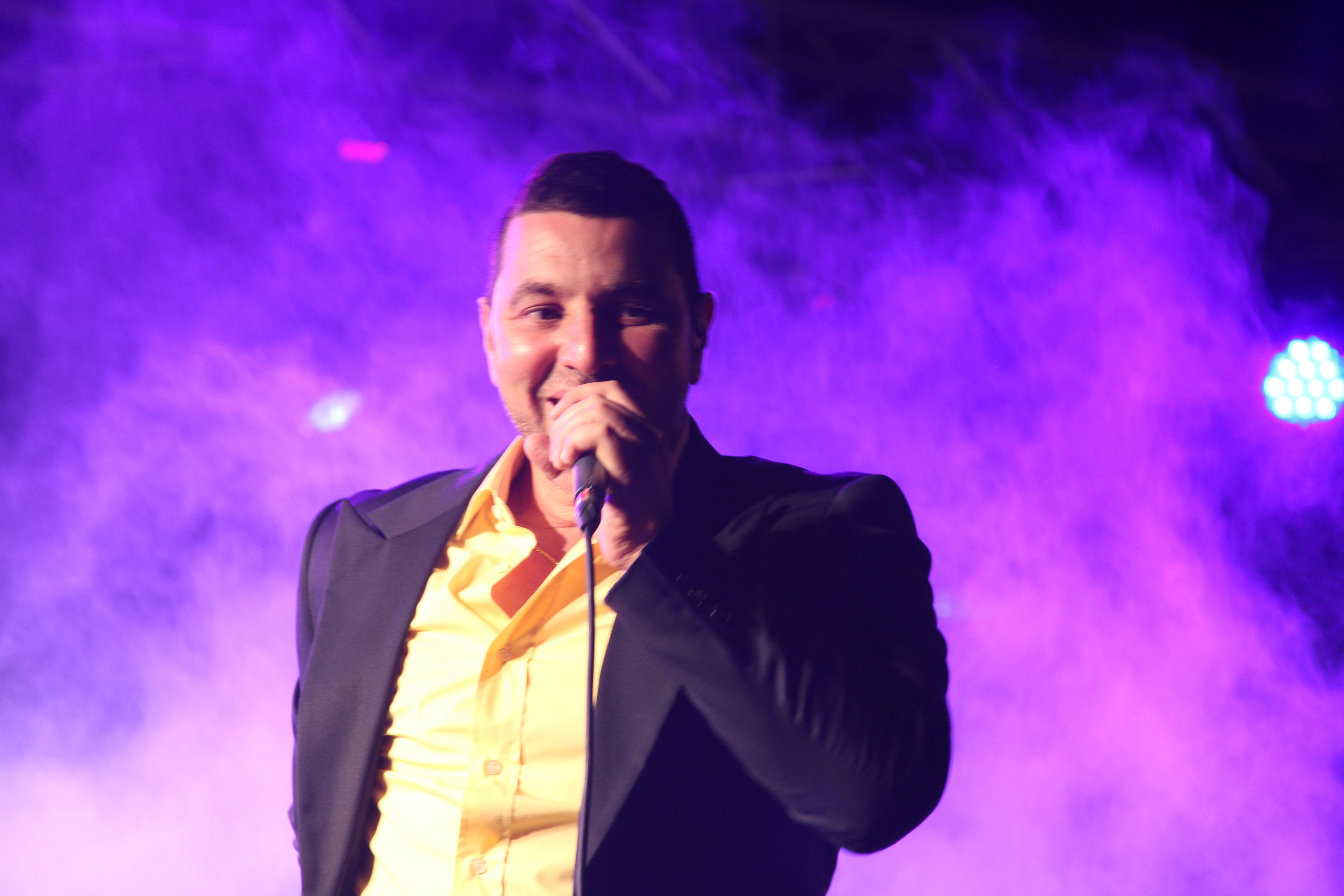 שלומי סרנגה בהופעה ביום העצמאות 2014 בצפת